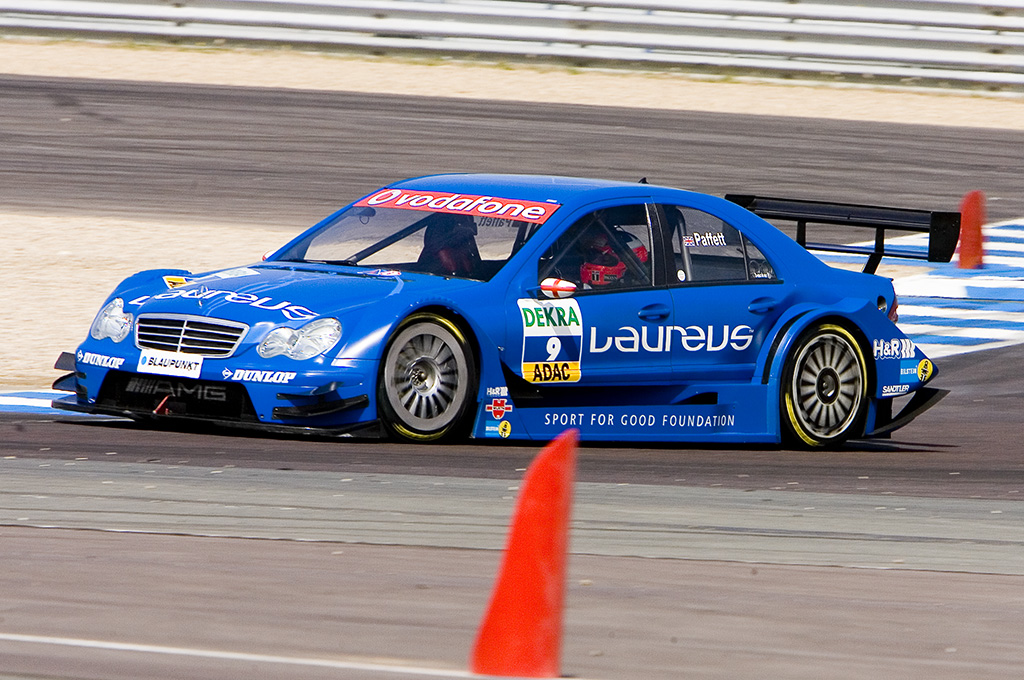 Gary Paffet bei der DTM